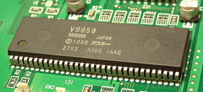 V9958(E-VDP-II)外観 2005年07月16日 Baz1521撮影